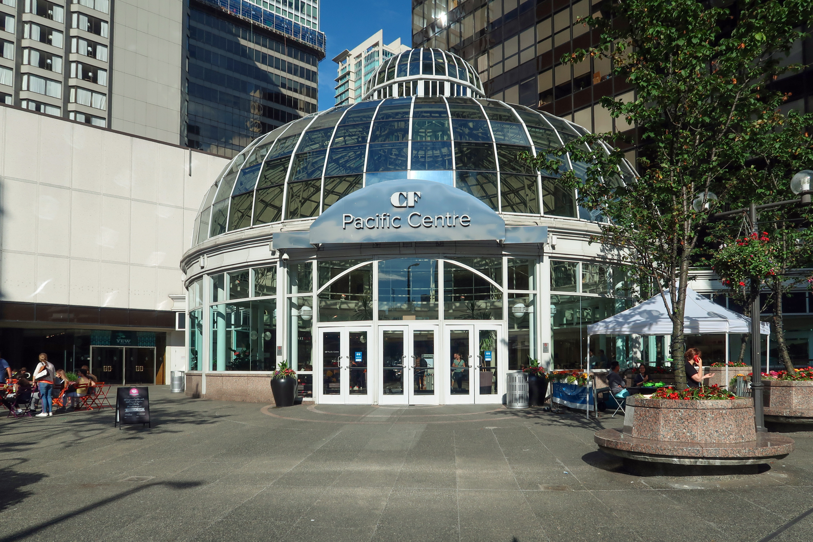 CF Pacific Centre Georgia Street Entrance